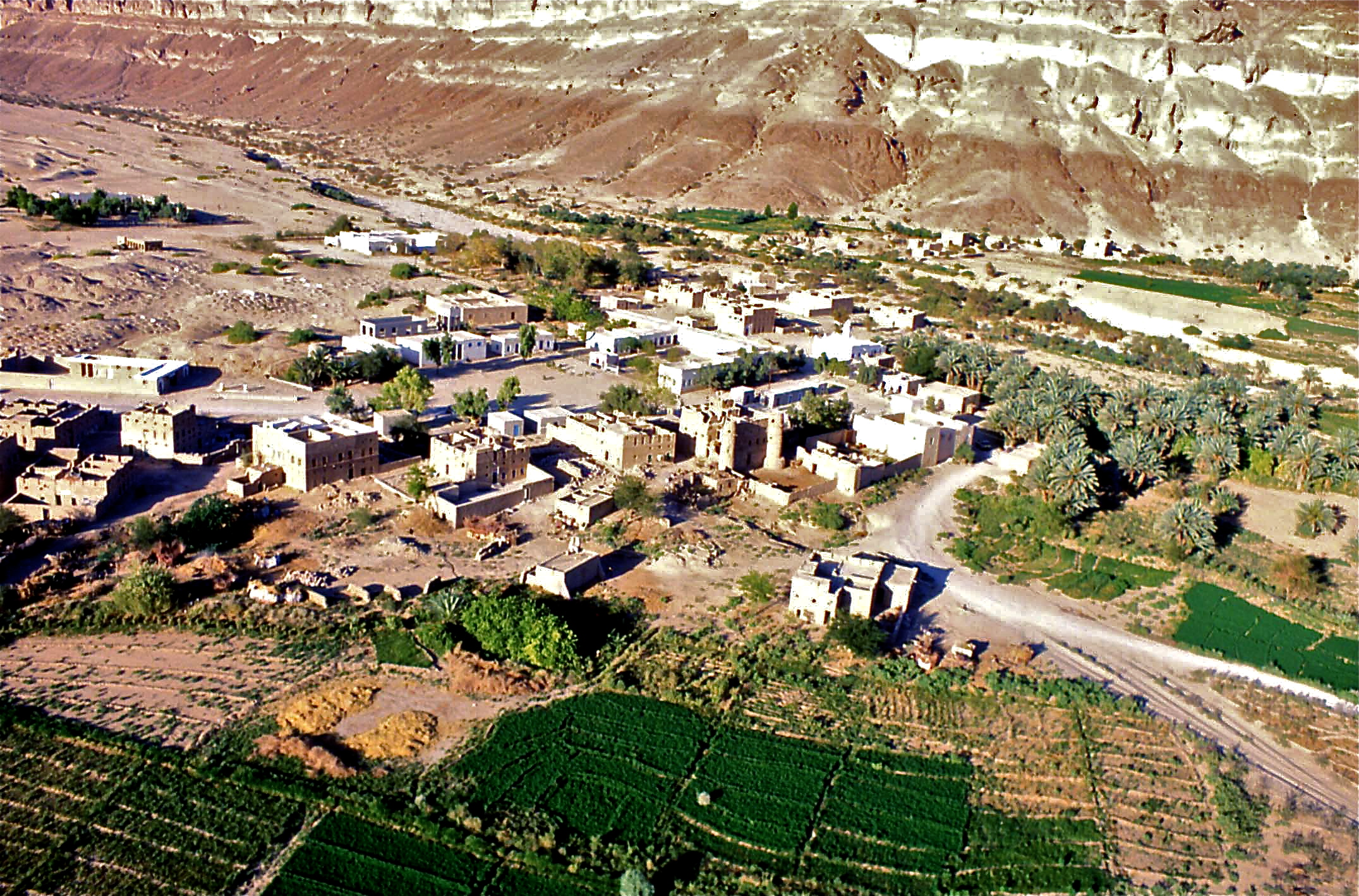 Yemen Wadi Hadhramaut 1994